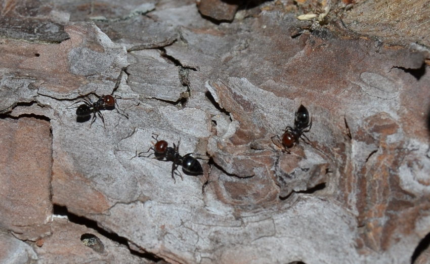 Crematogaster scutellaris.